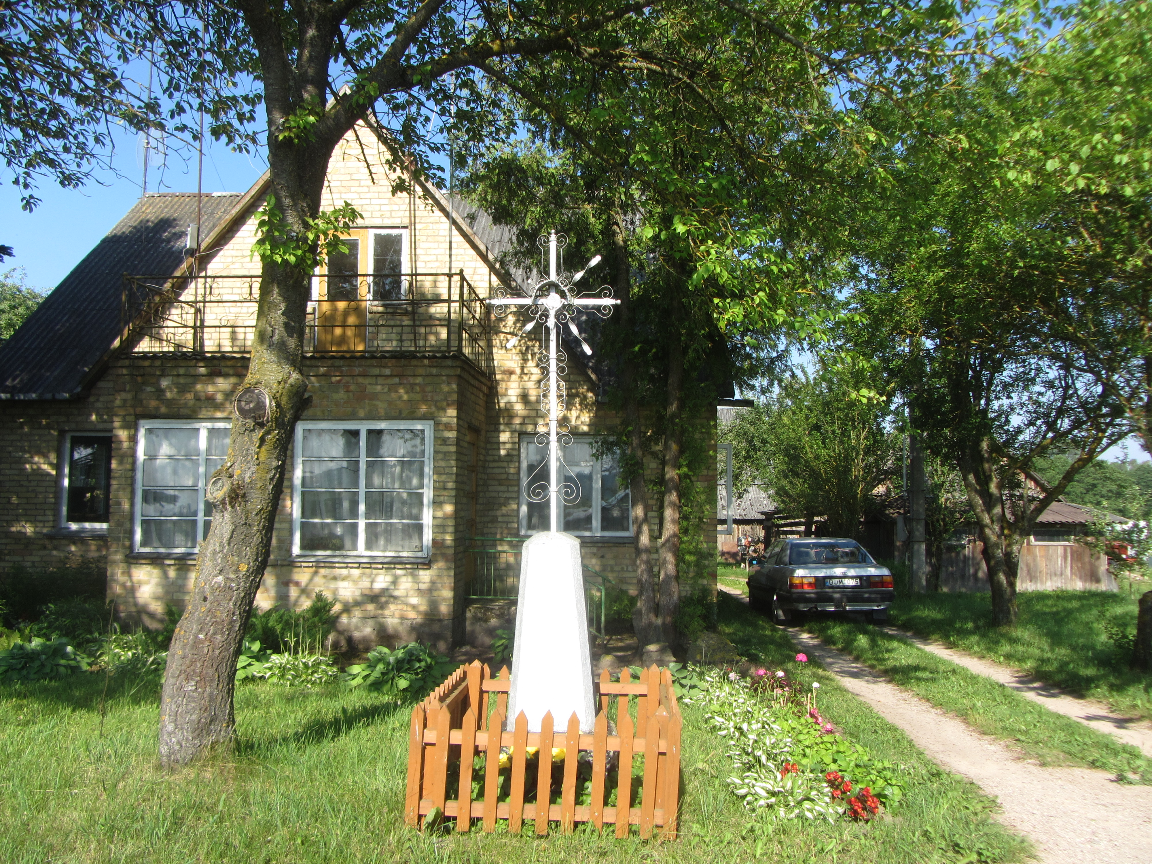 Straigiai 67234, Lithuania